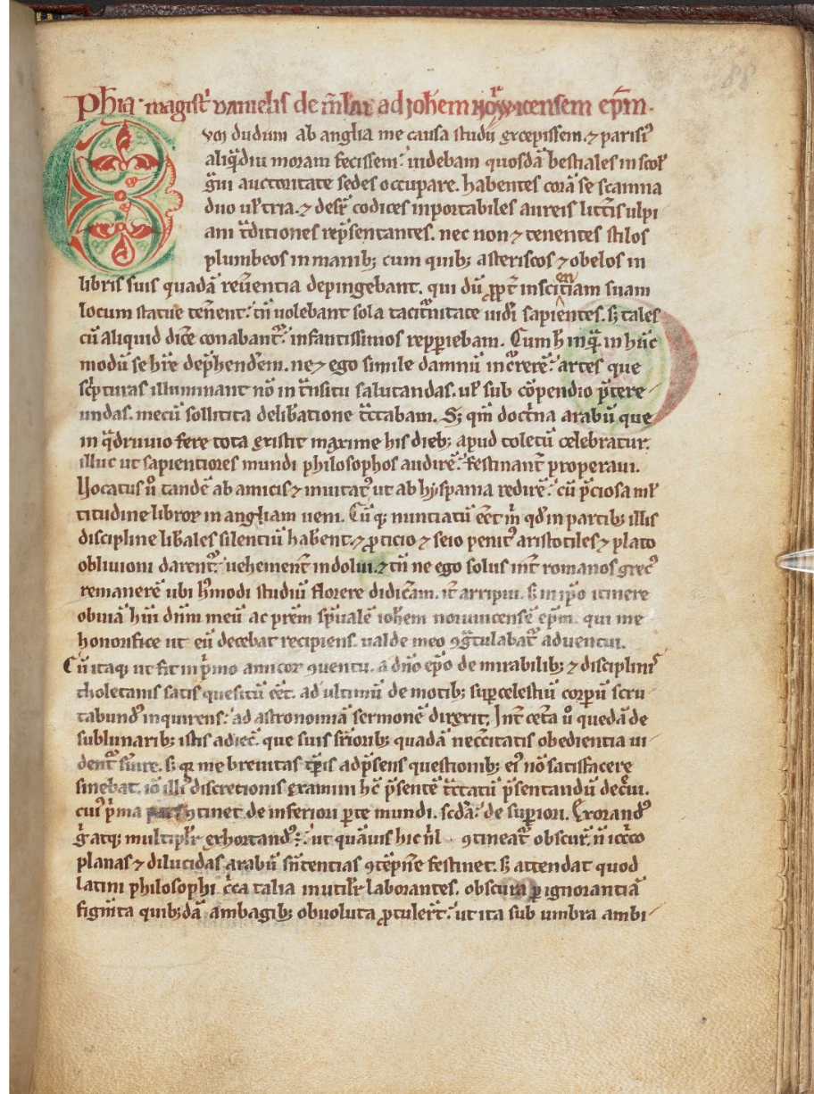 Feuillet 88 recto du manuscrit Arundel MS 377